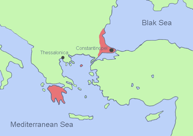 L'Impero bizantino nella metà del XV secolo